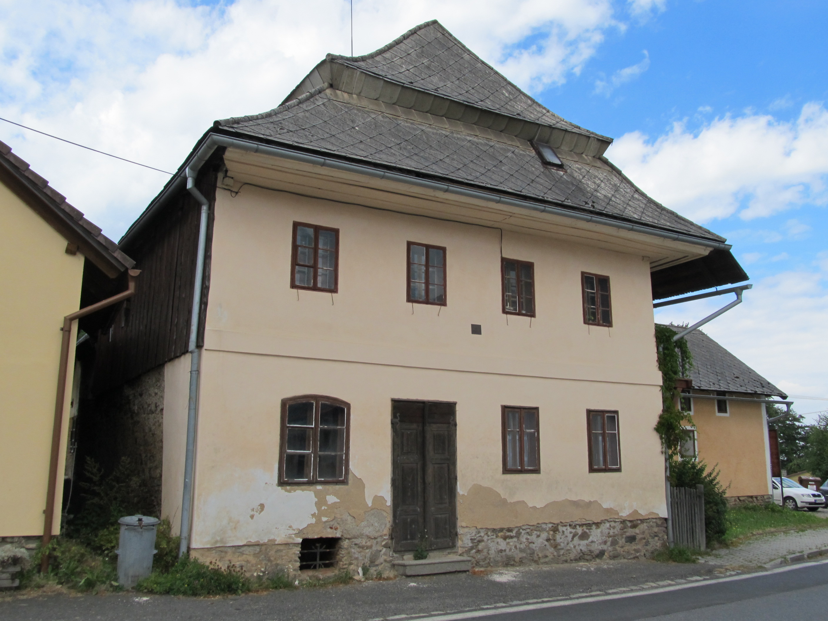 Čachrov